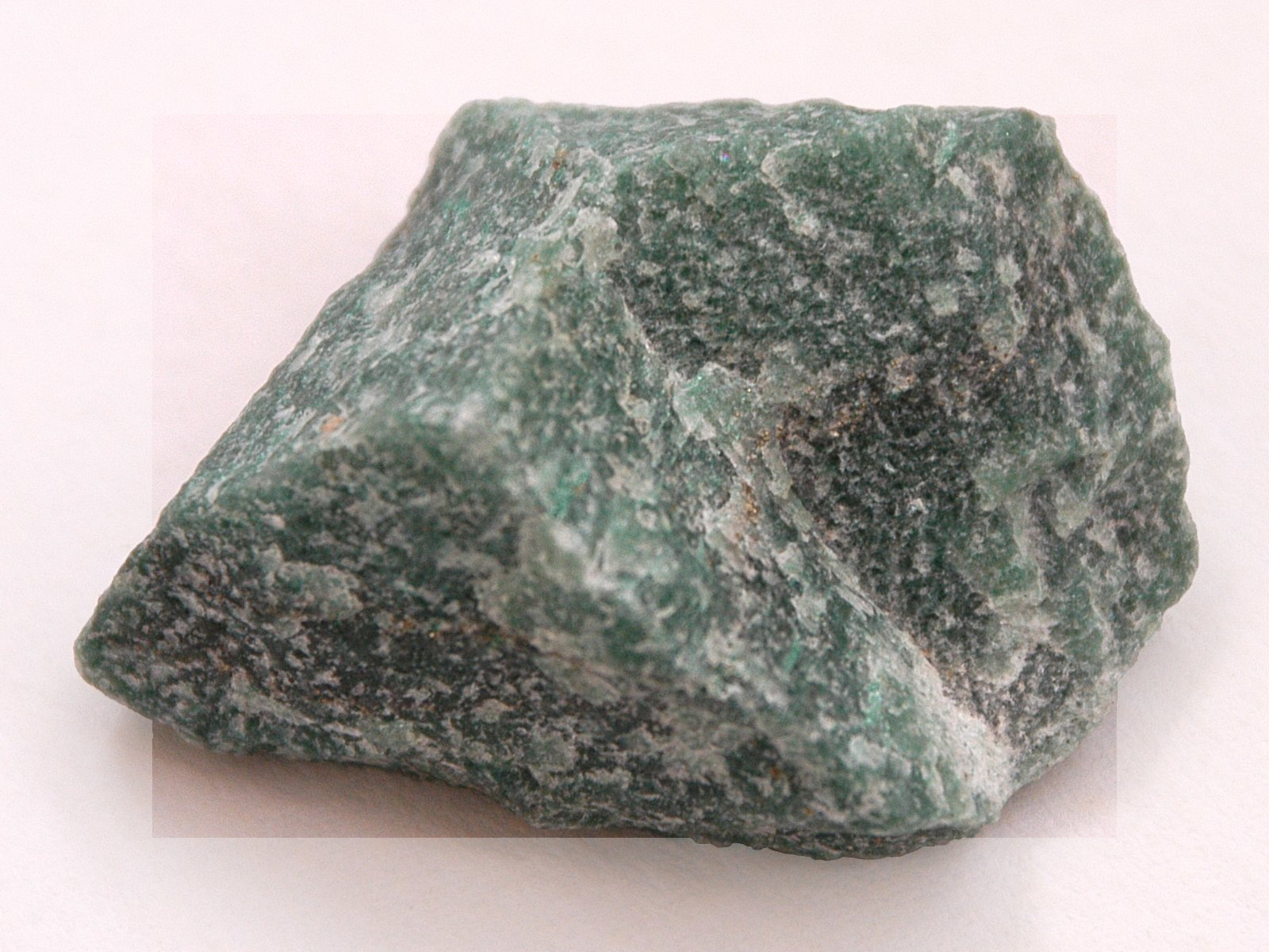 Aventurin, ungeschliffen / Aventurine, not smoothed